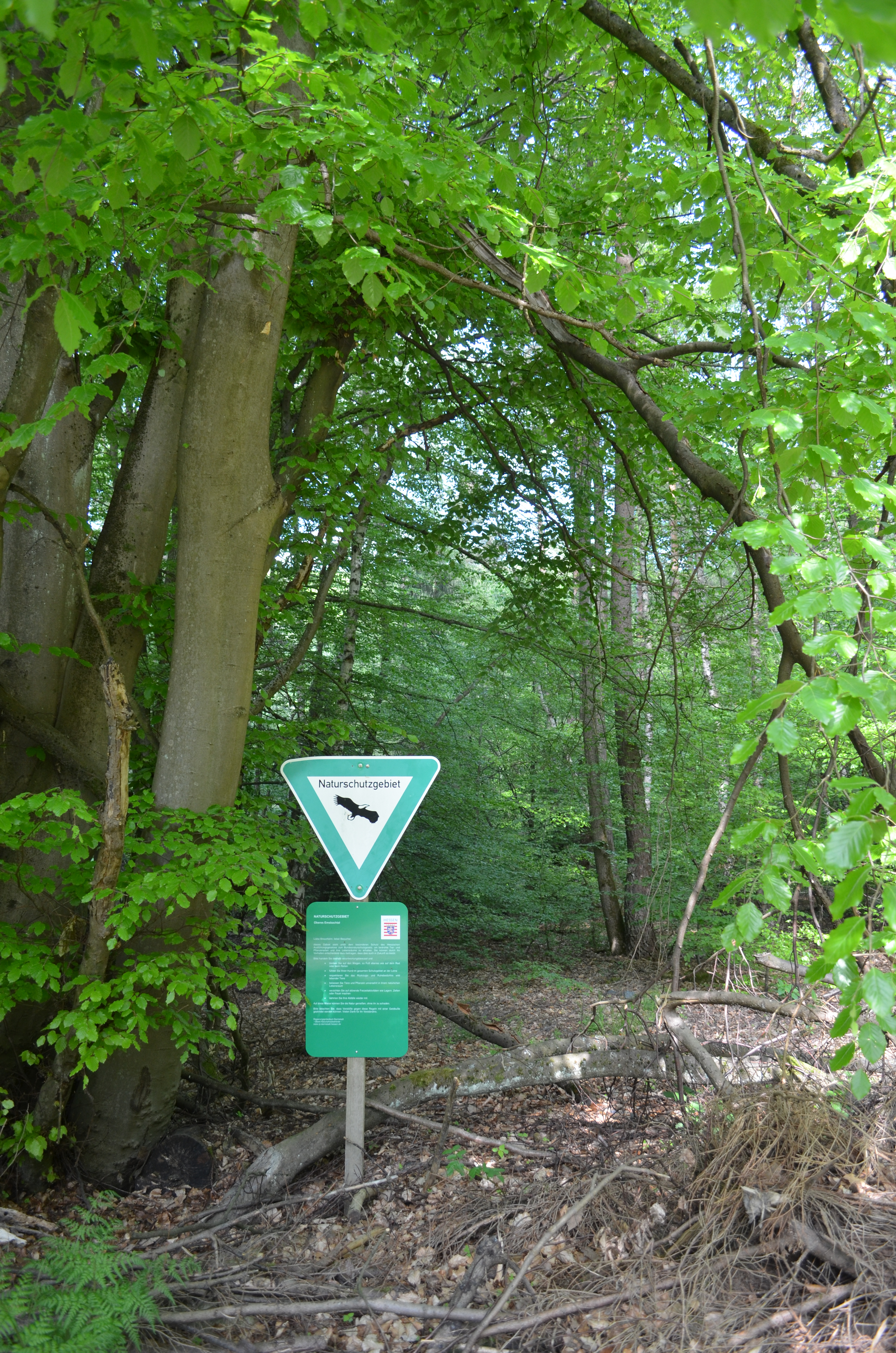 Naturschutzgebiet Oberes Emsbachtal, NSG-Schild